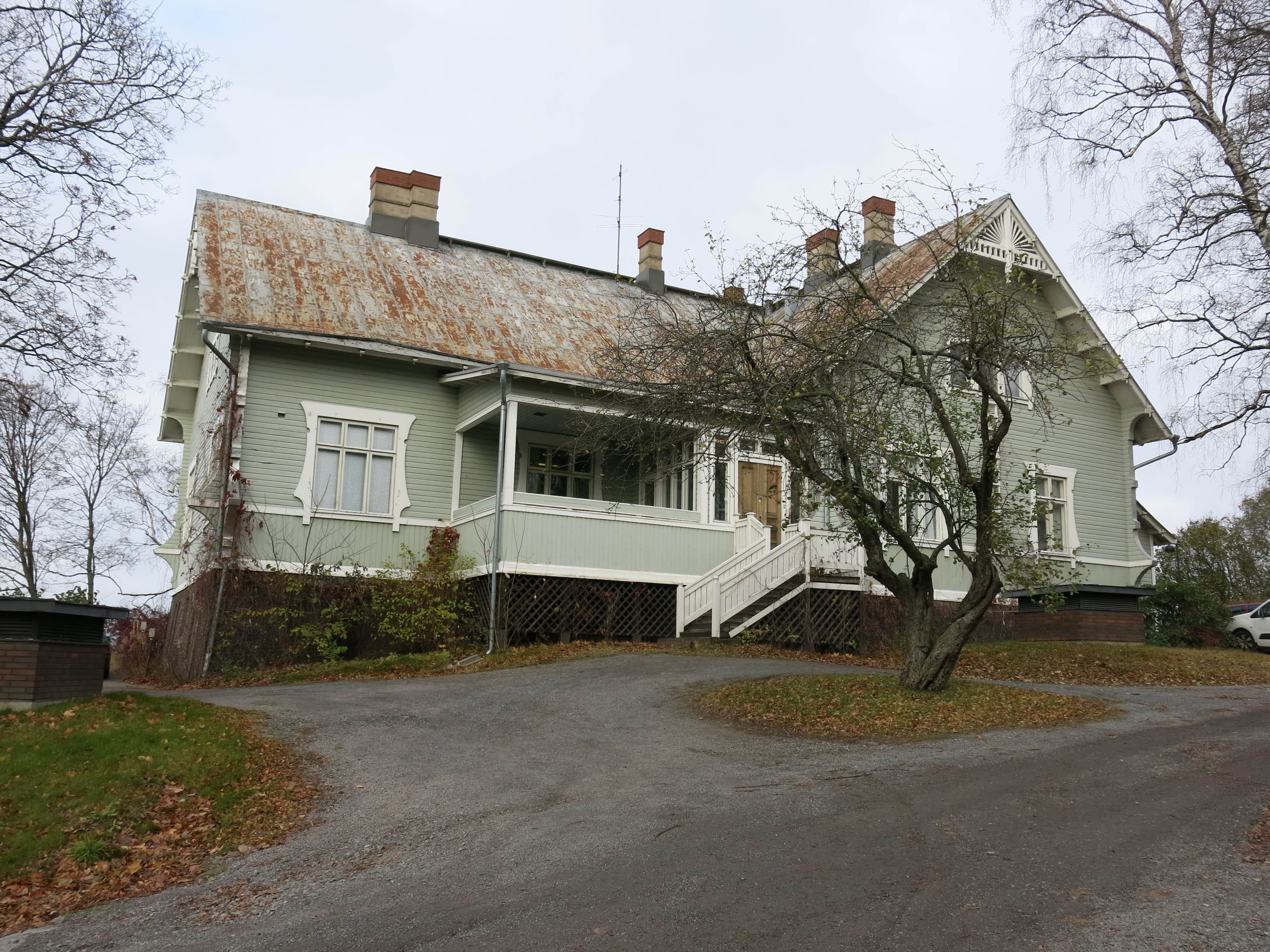 Ryselinin talo_Henrik Mattjus